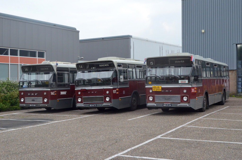 Opstelling van CSA-I bussen tijdens de viering, te Den Haag, van 50 jaar Standaard Stadsbussen in Nederland. Bussen van de eerste generatie uit Rotterdam (RET 562), Den Haag (HTM 117) en Amsterdam (GVB 301). Foto: Erik Swierstra.